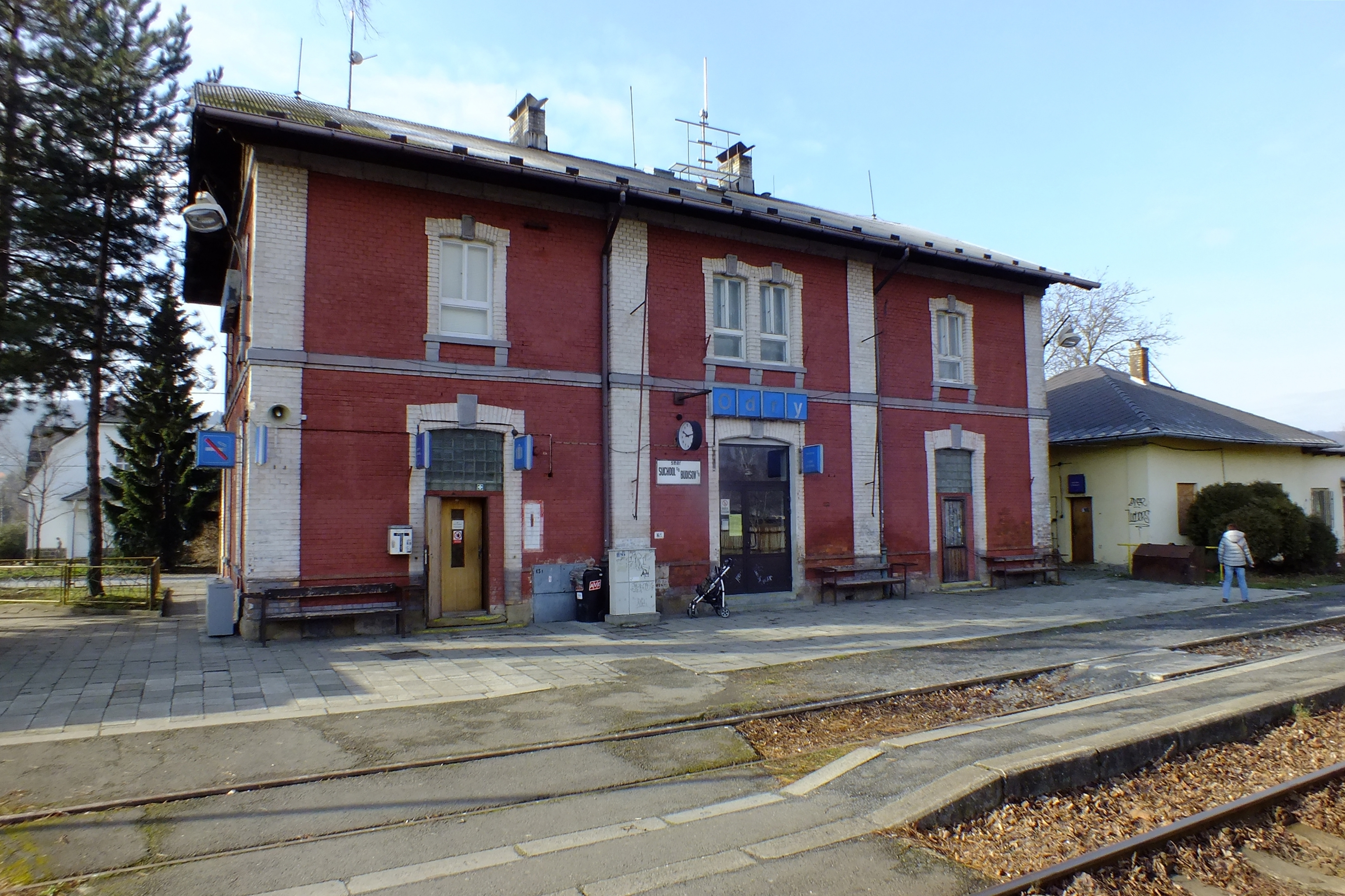 Staniční budova